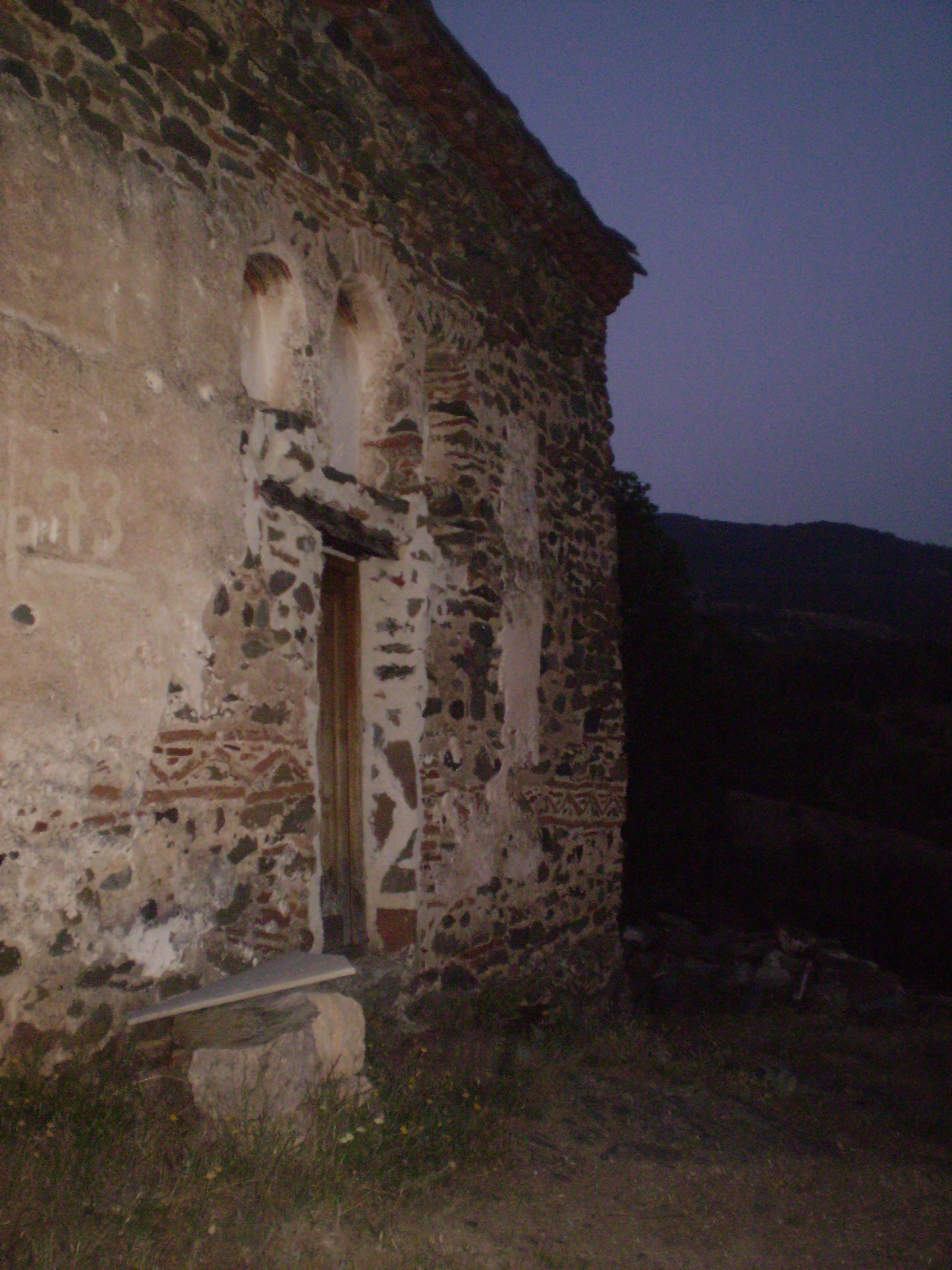 Црква Пресвете Богородице се налази на геоморфолошком локалитету Вражји камен. Црква је саграђена у 14. веку, и за њену изградњу су везане многе легенде.